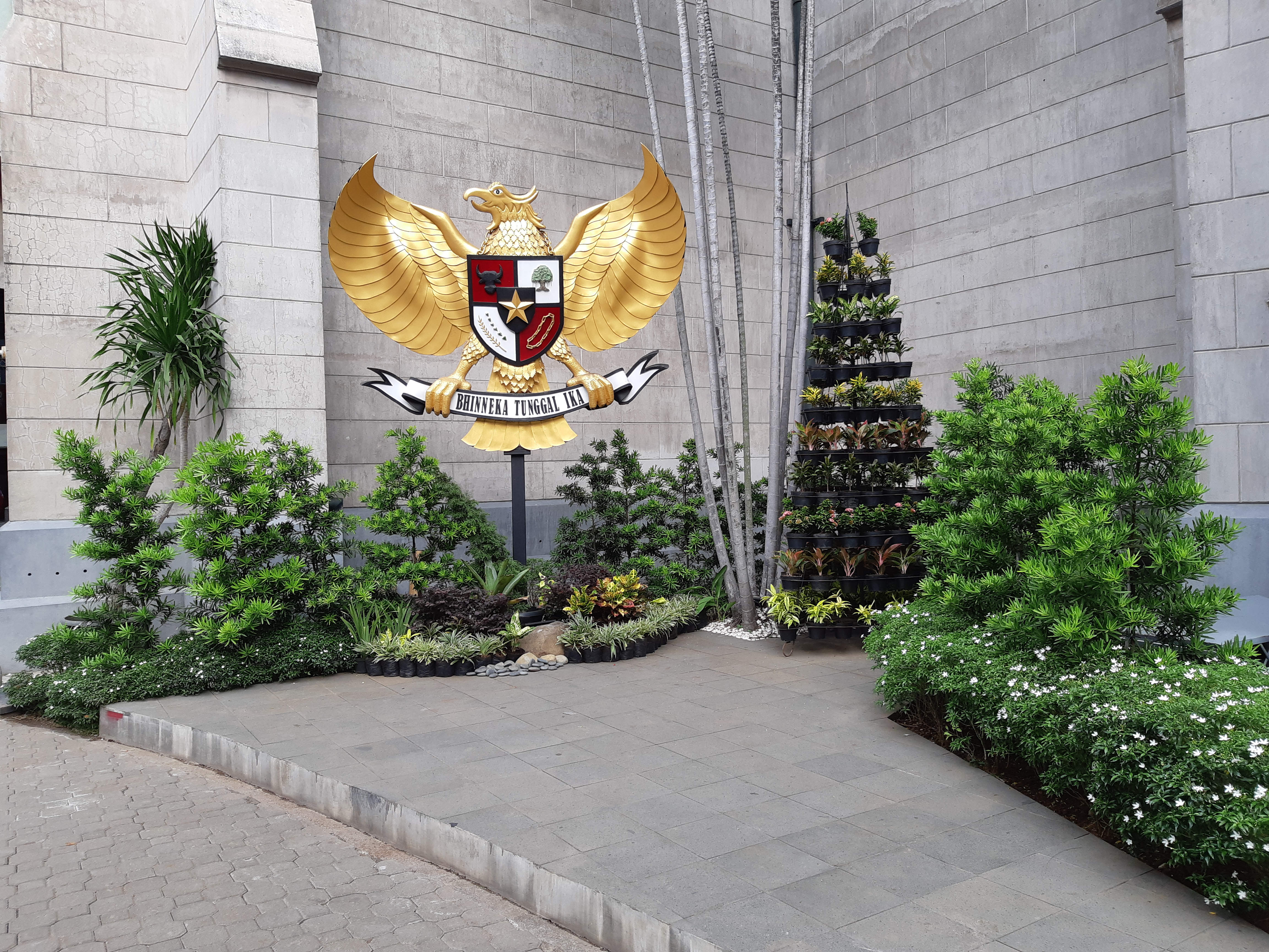 Plaza Pancasila Gereja Katedral Jakarta